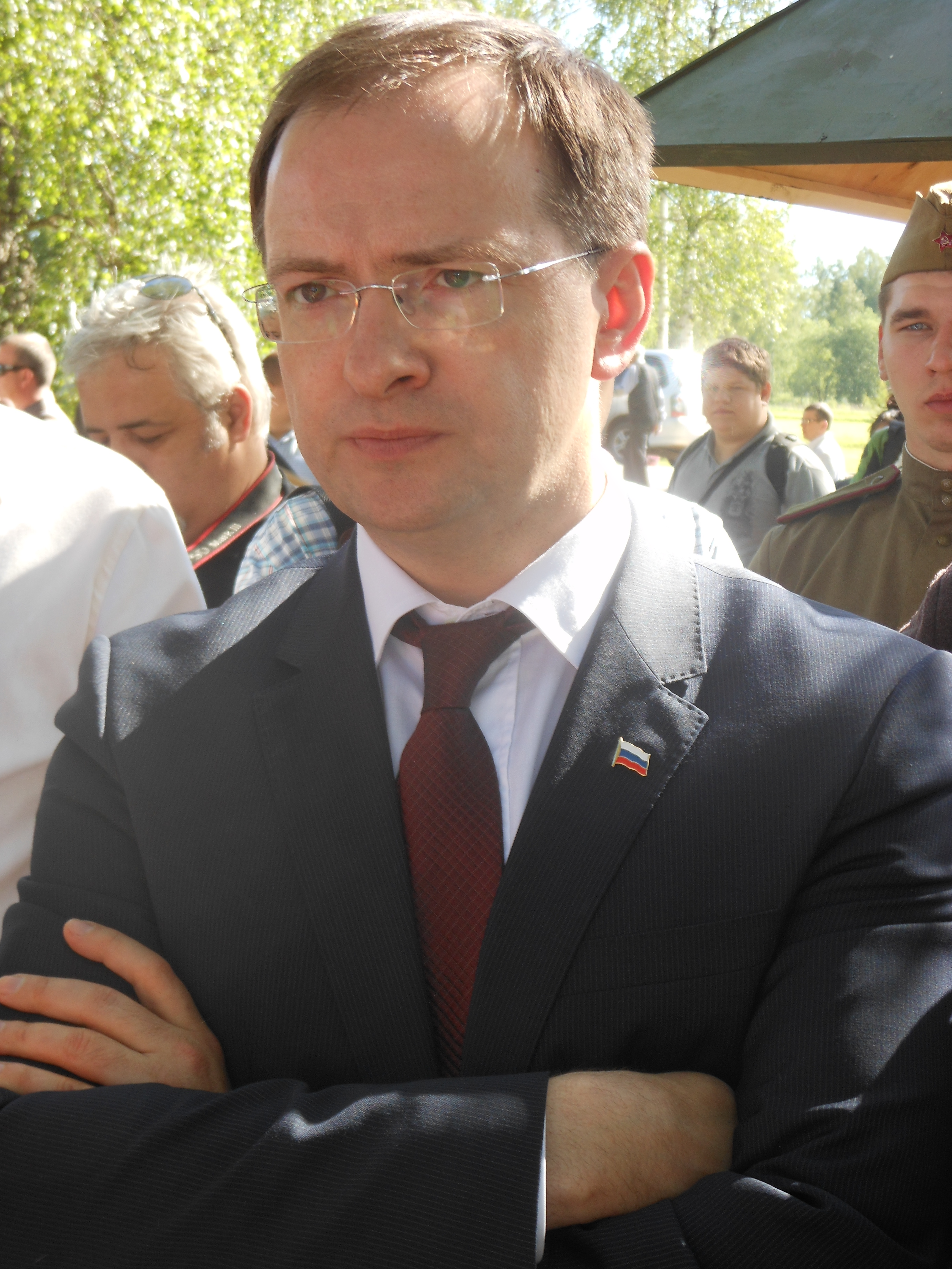 Министр культуры РФ Владимир Мединский в Бородино (2015)